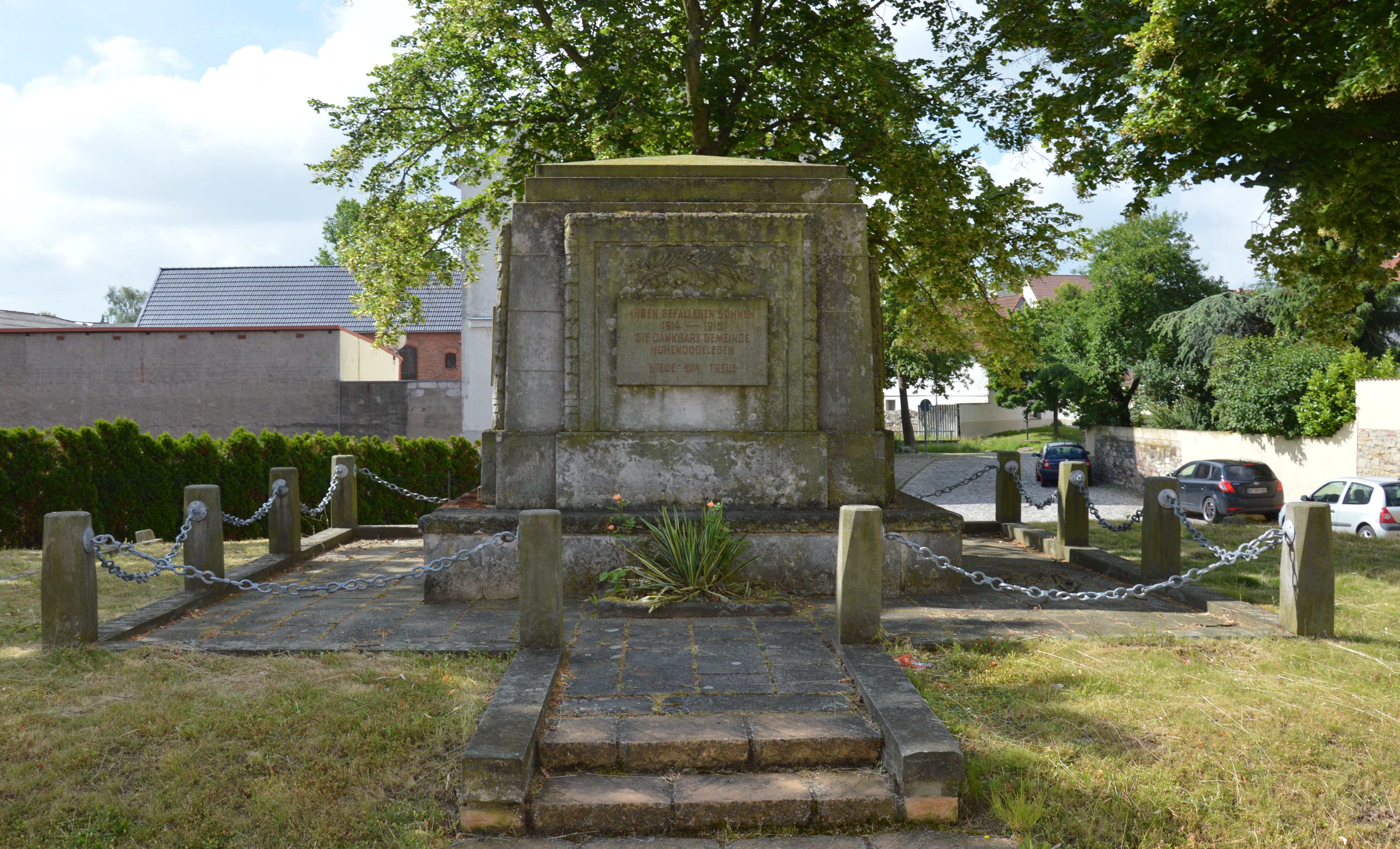 Kriegerdenkmal Hohendodeleben Matthissonstraße